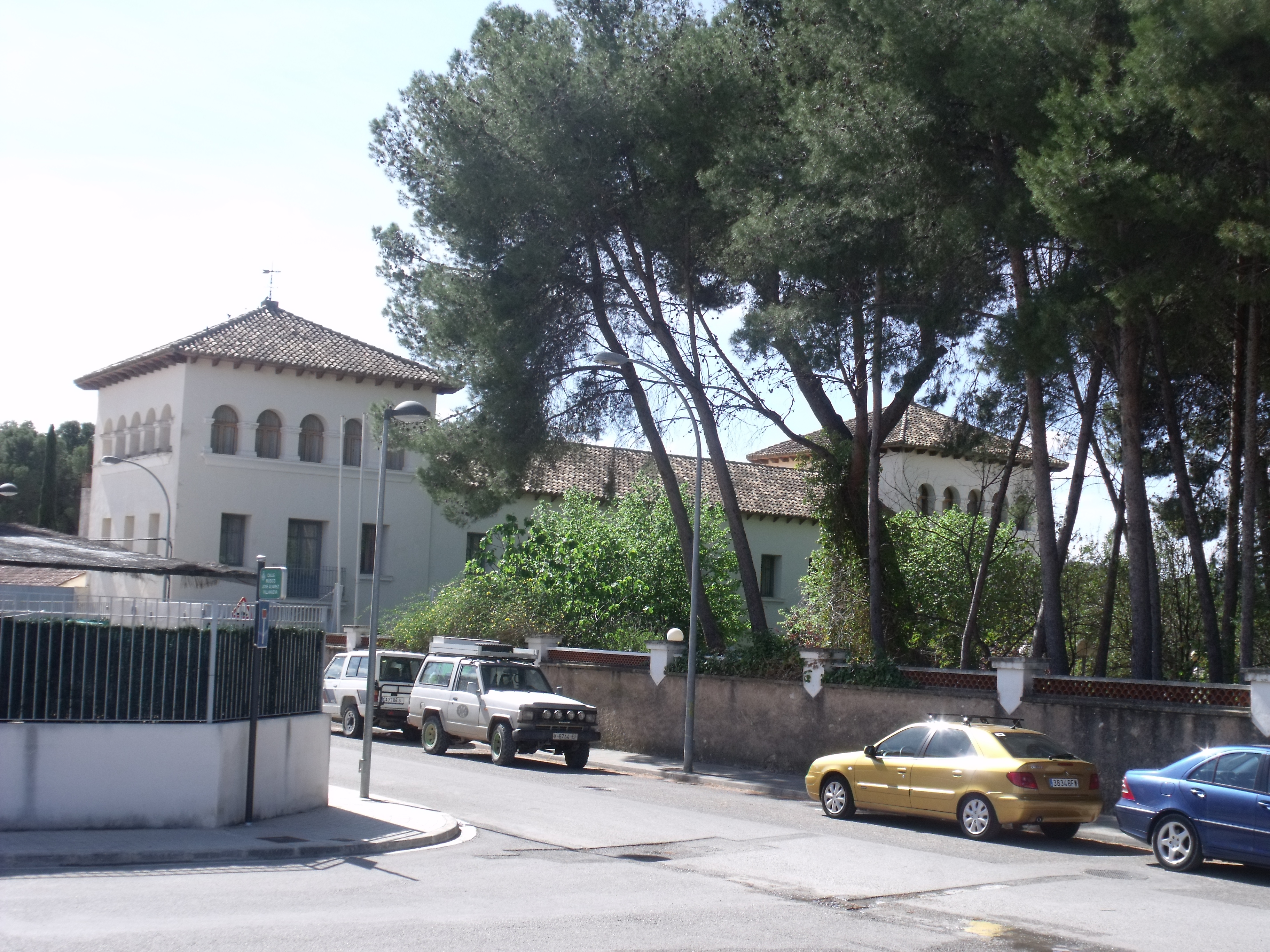 Alberg juvenil Torre d'Alboraig